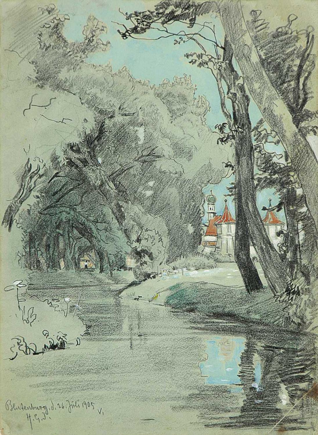 Blutenburg in München, Mischtechnik, 30 x 22 cm